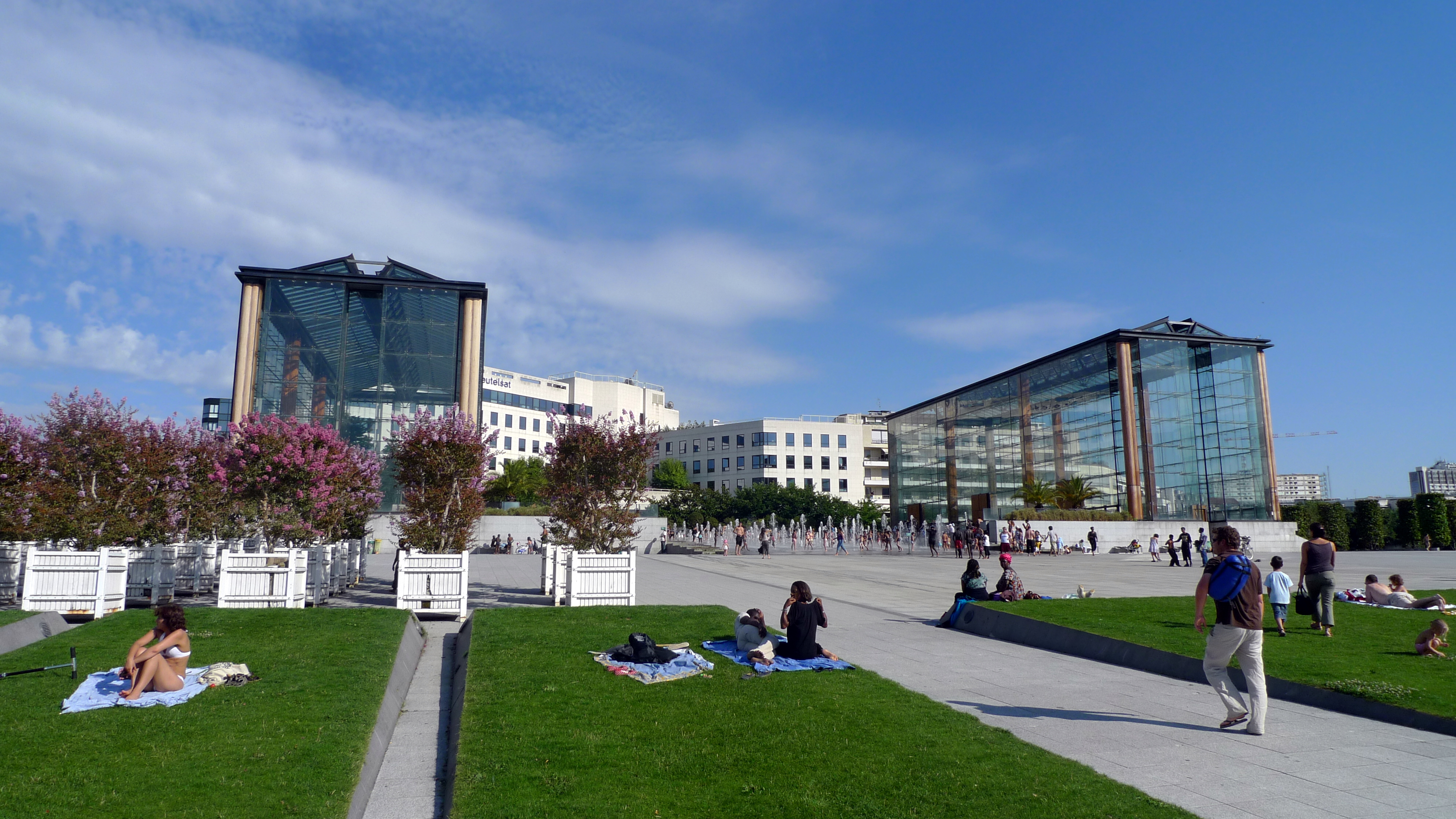 jardin André Citroën (PARIS,FR75)